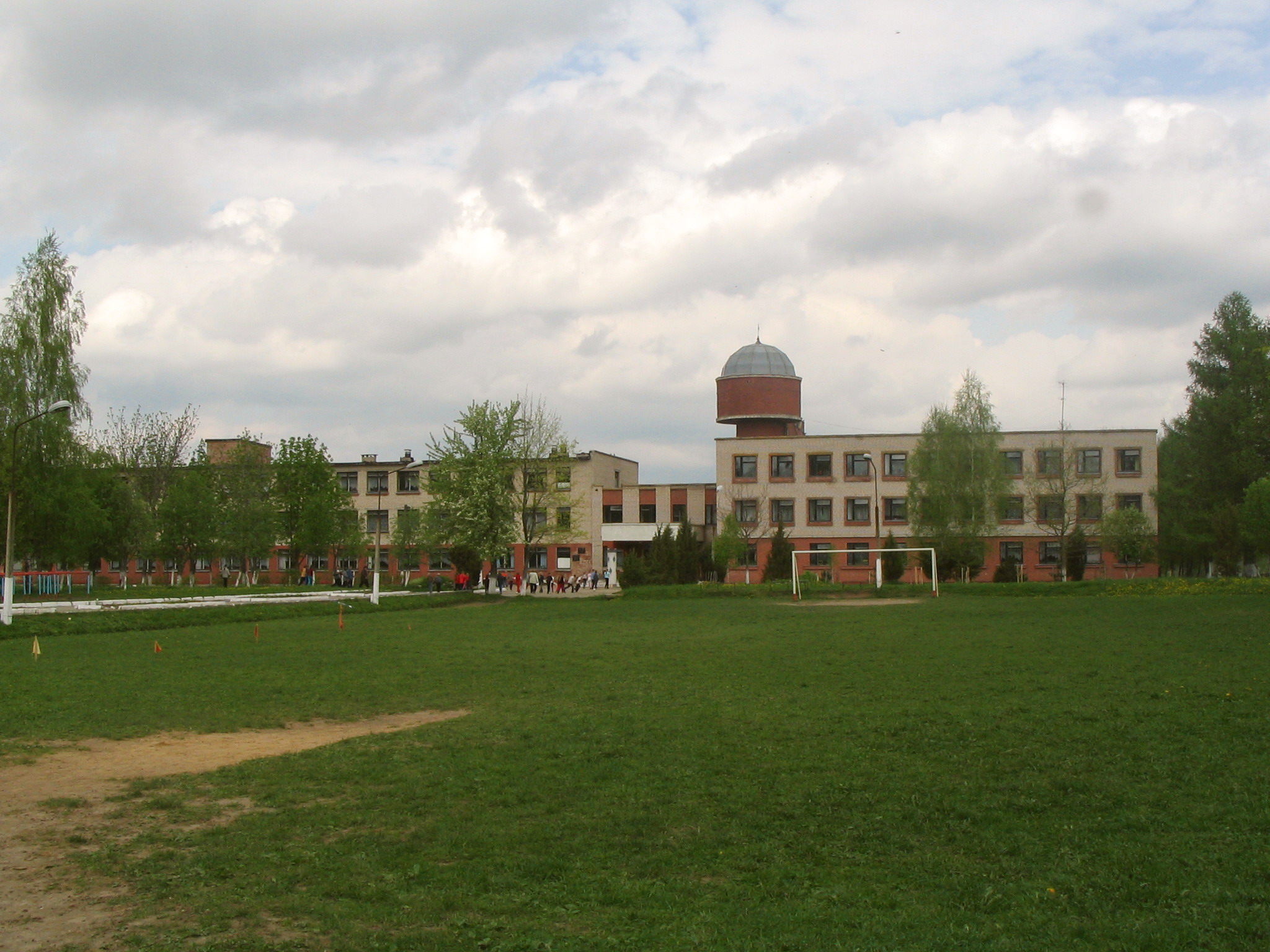 Кохановская средняя школа, 18 мая 2005 года